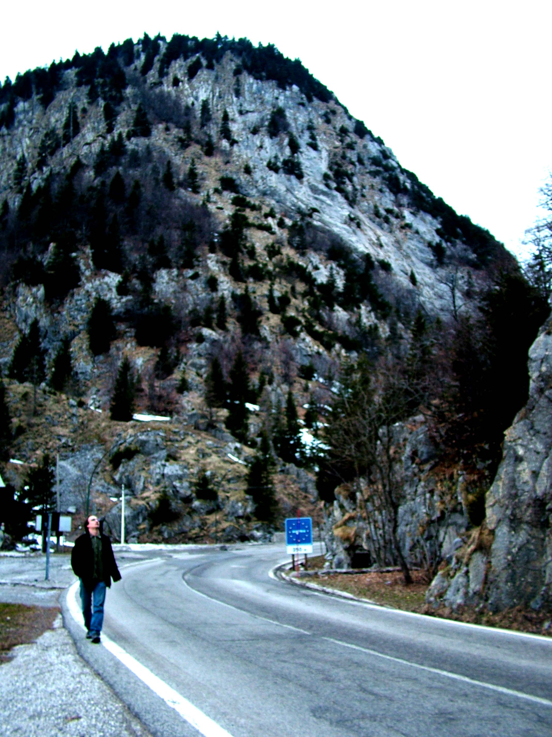 Plöcken-hágó, az északi (osztrák) hágóút részlete